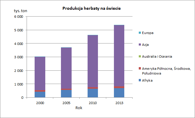 Źródło: Rocznik Statystyki Międzynarodowej 2015